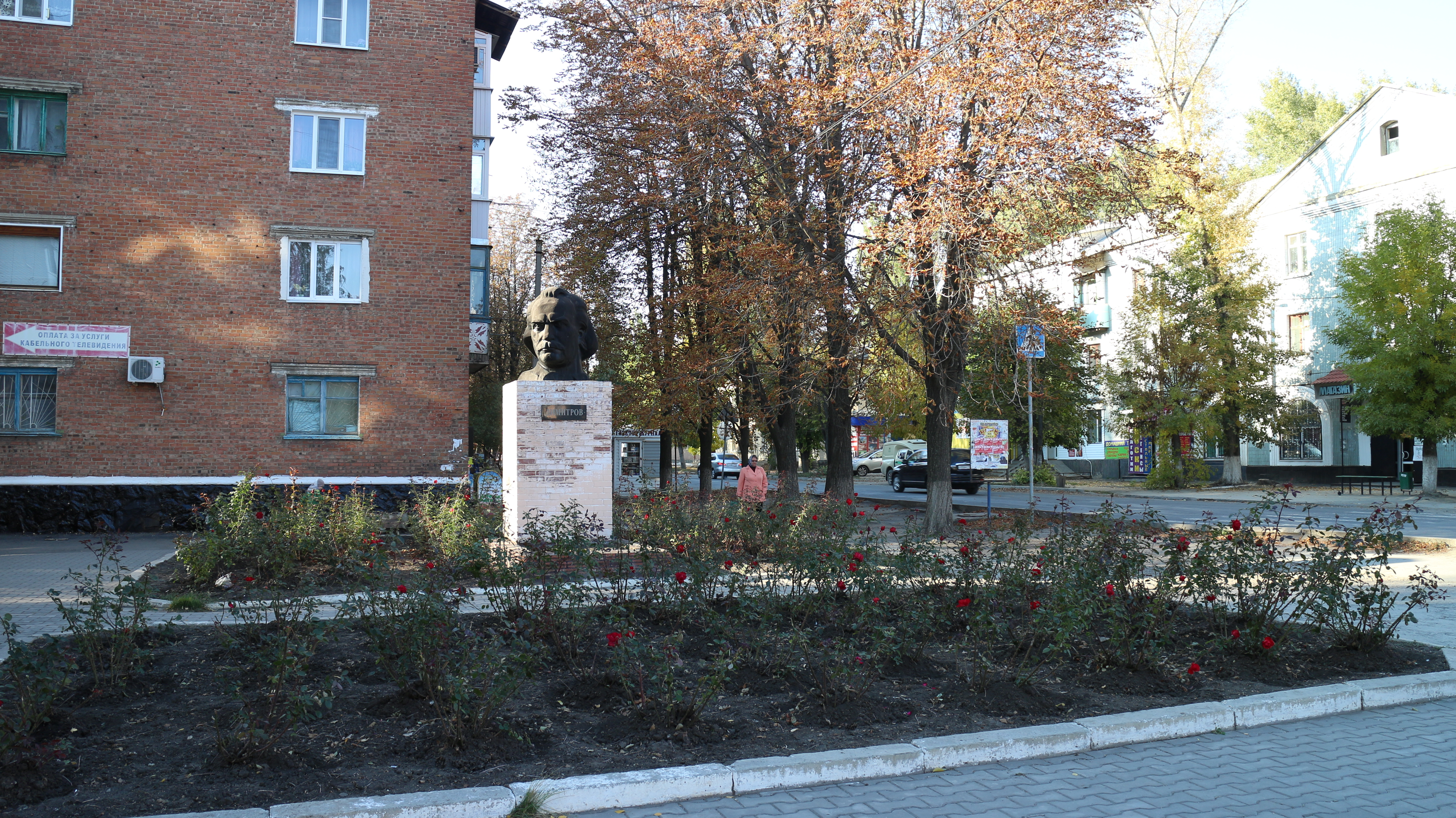 улица Карла Маркса Гуково, Ростовская область, Россия